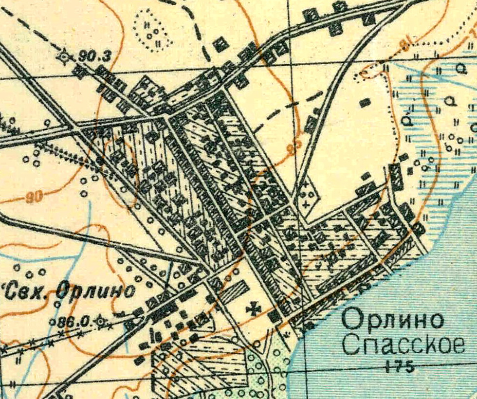 Топографическая карта Ленинградской области, квадрат О-36-25-А-а (Лампово), деревня Орлино